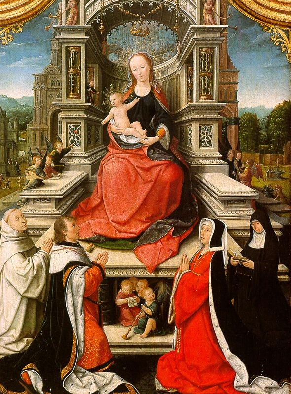 Le Cellier Triptych